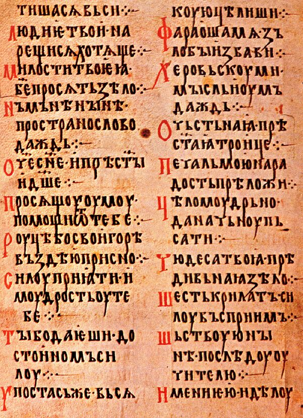 Alphabet Prayer